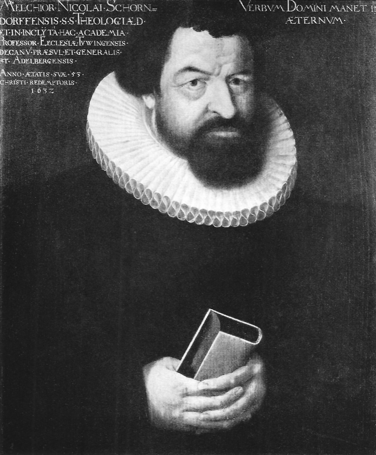 Prof. Melchior Nicolai (Ölbildnis in der Tübinger Professorengalerie)